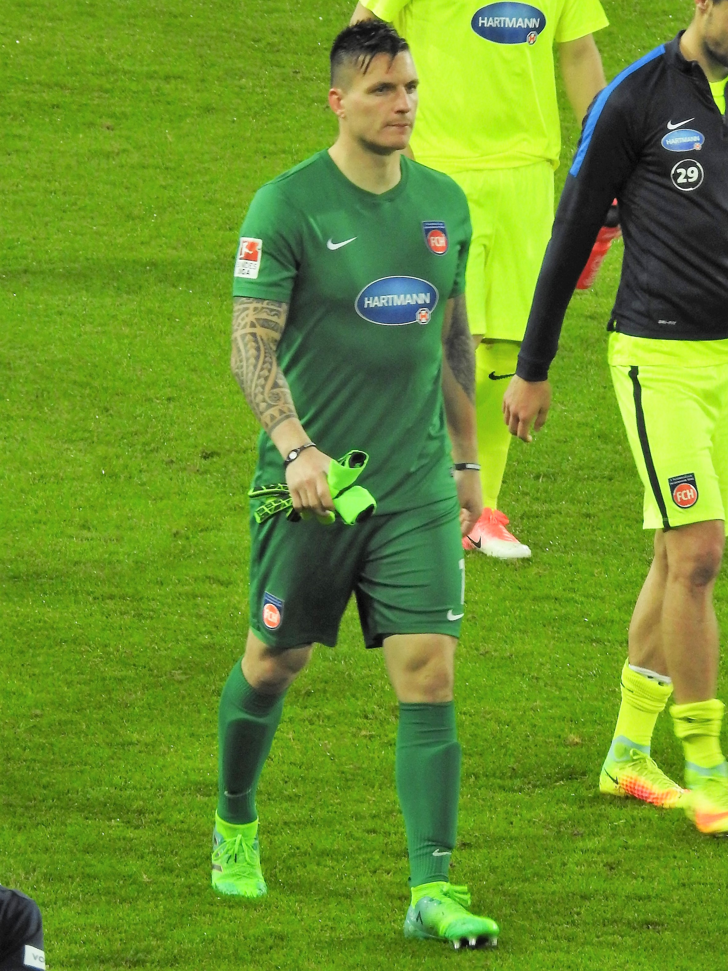 Kevin Müller 2017